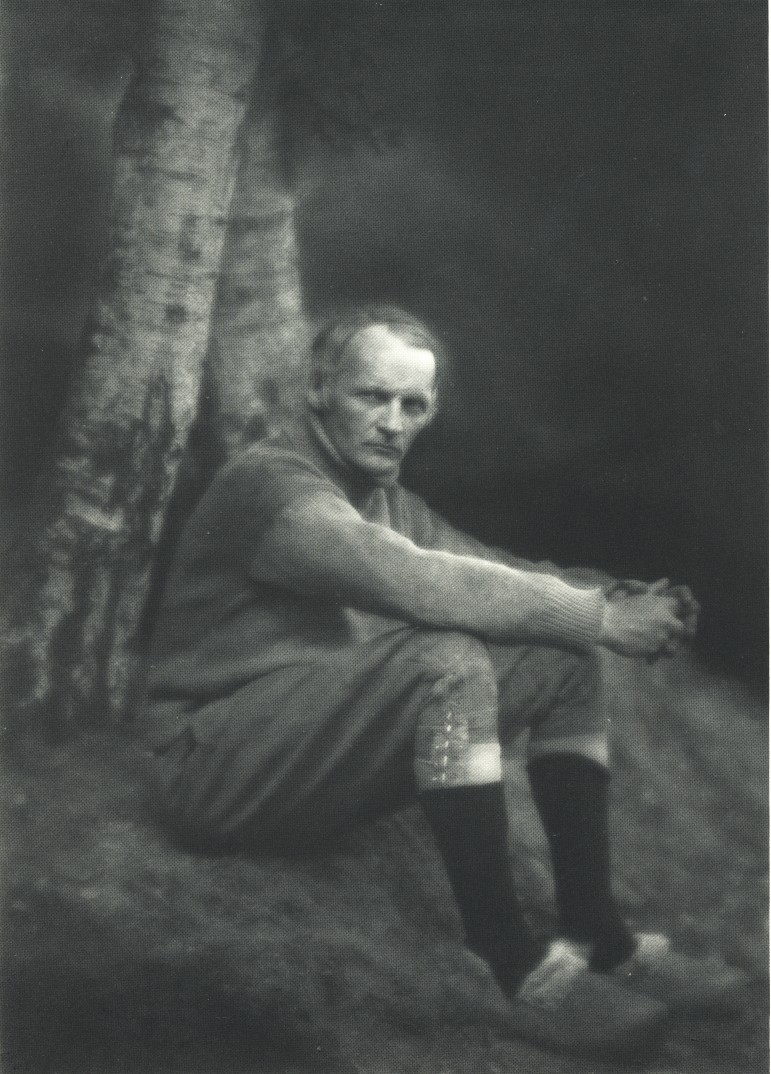 Porträt des Malers Heinrich Vogeler.